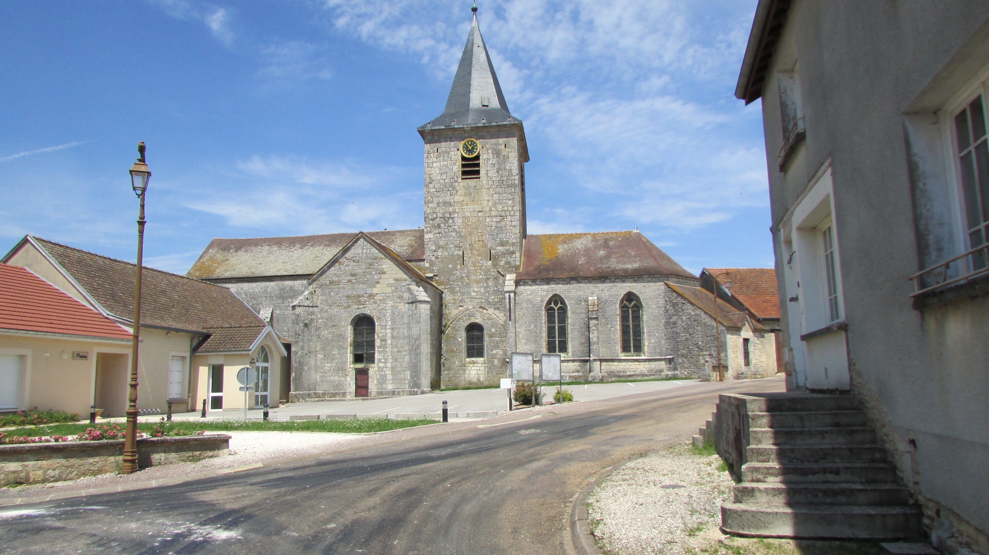 L'église de Darmannes , Haute-Marne